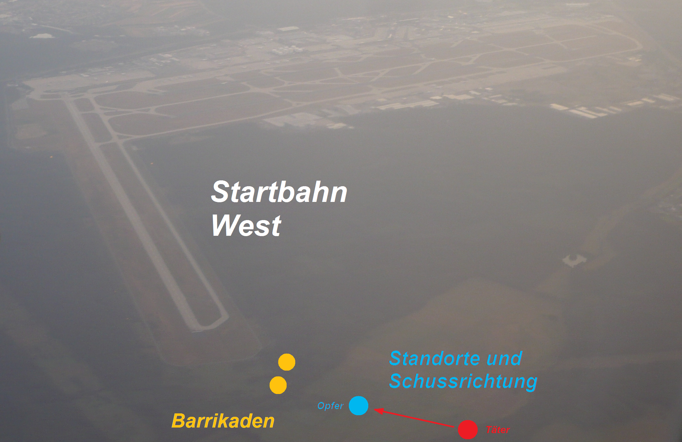 Tötungsdelikte an der Startbahn West